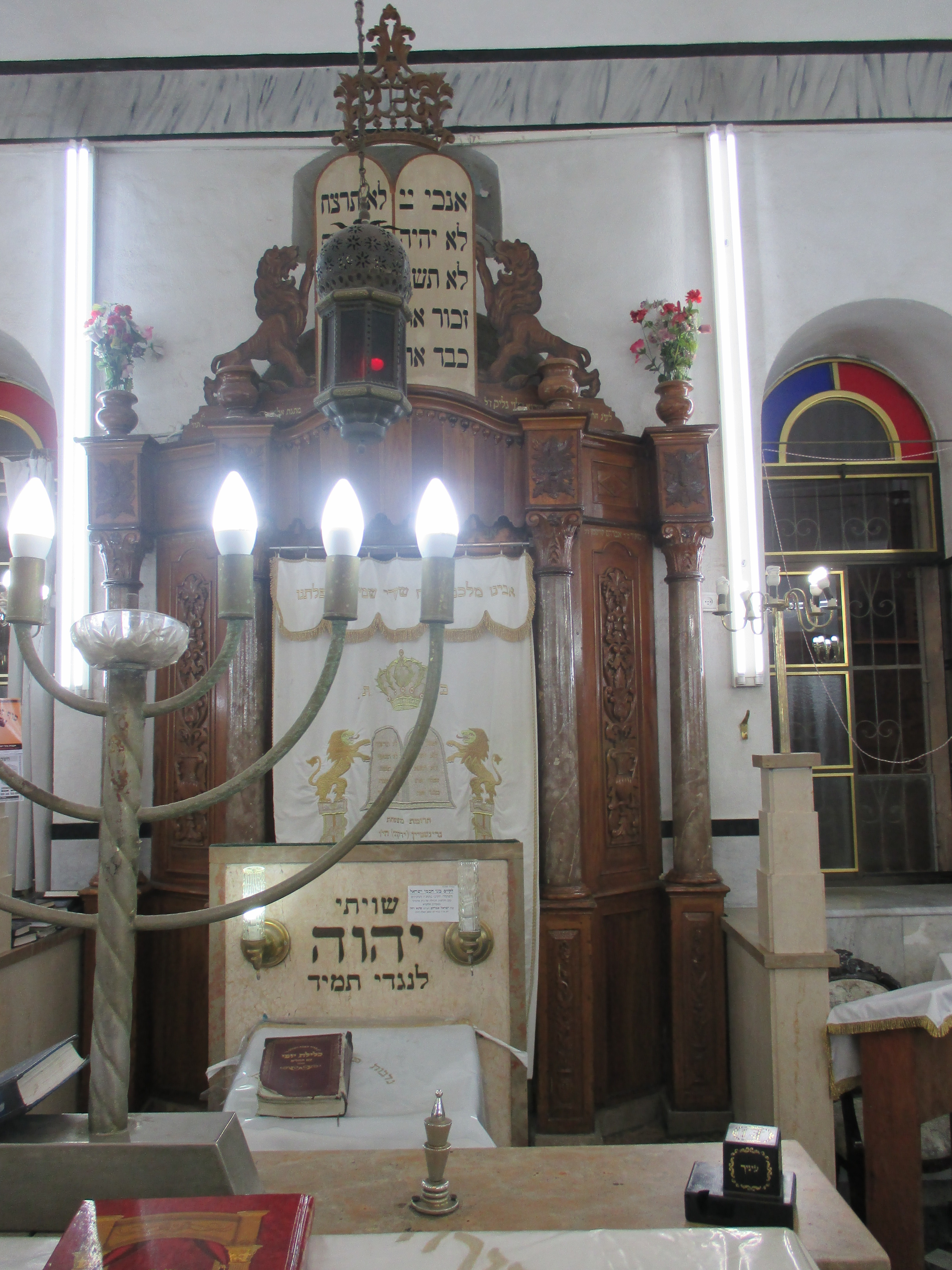 הבימה וארון הקודש בזיכרון משה